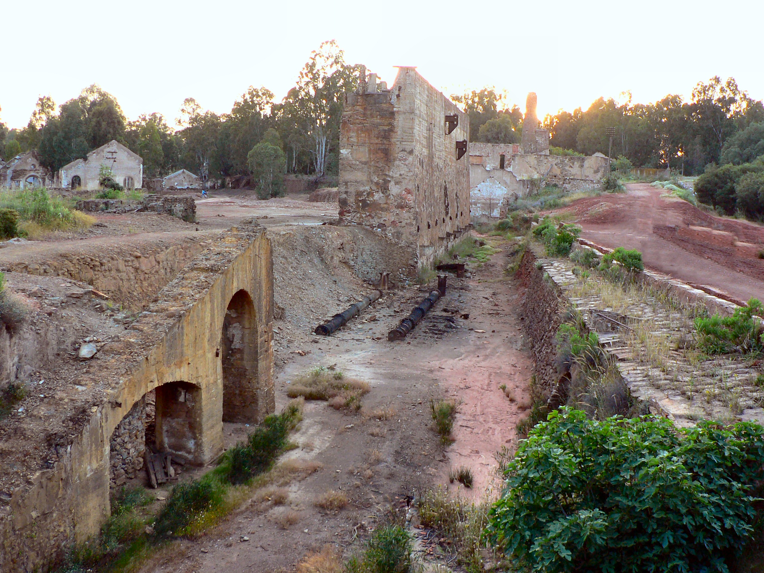 Instalações abandonadas das Minas de São Domingos